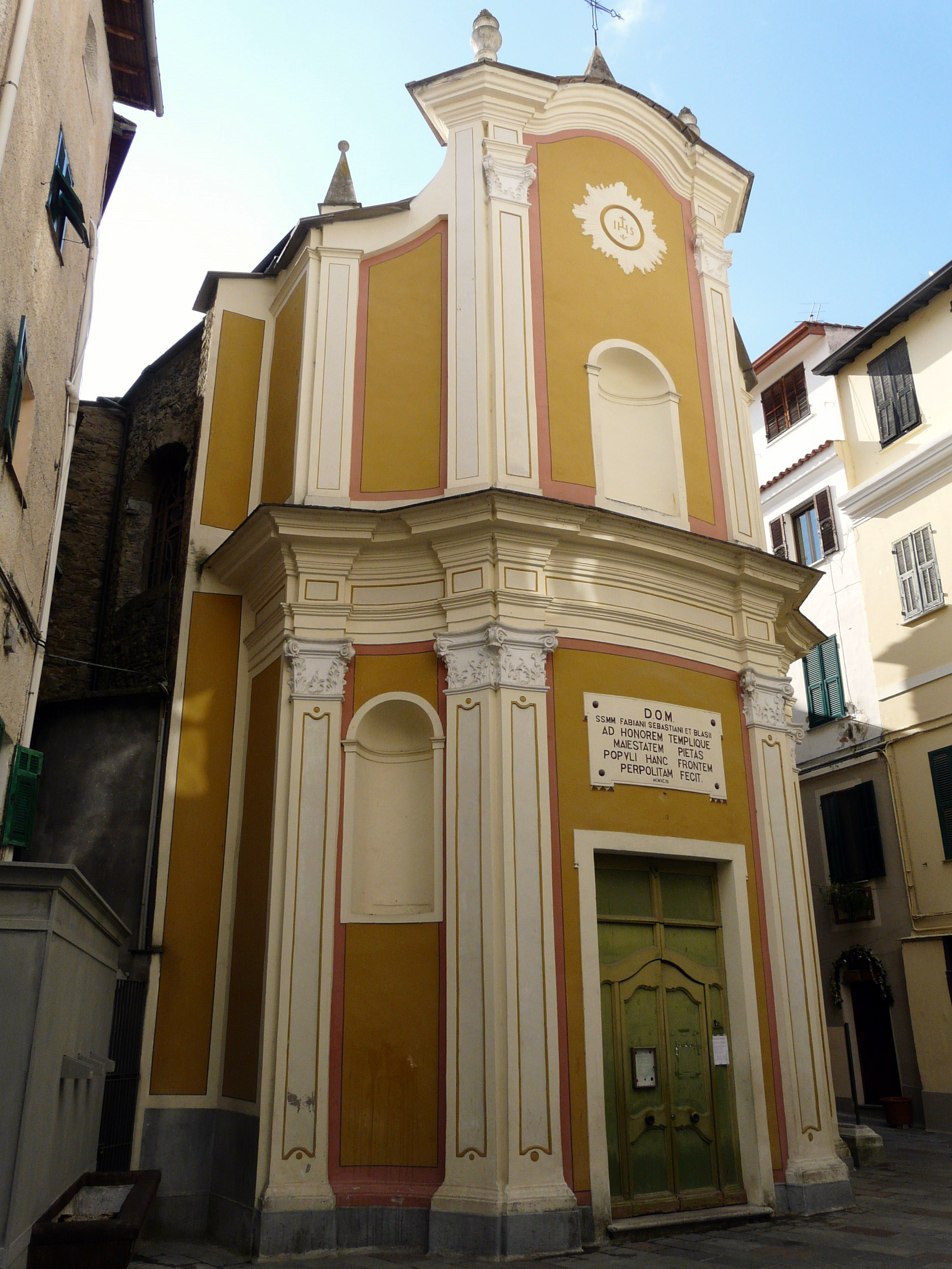 Chiesa dei Santi Fabiano, Sebastiano e Biagio, San Biagio della Cima, Liguria, Italia